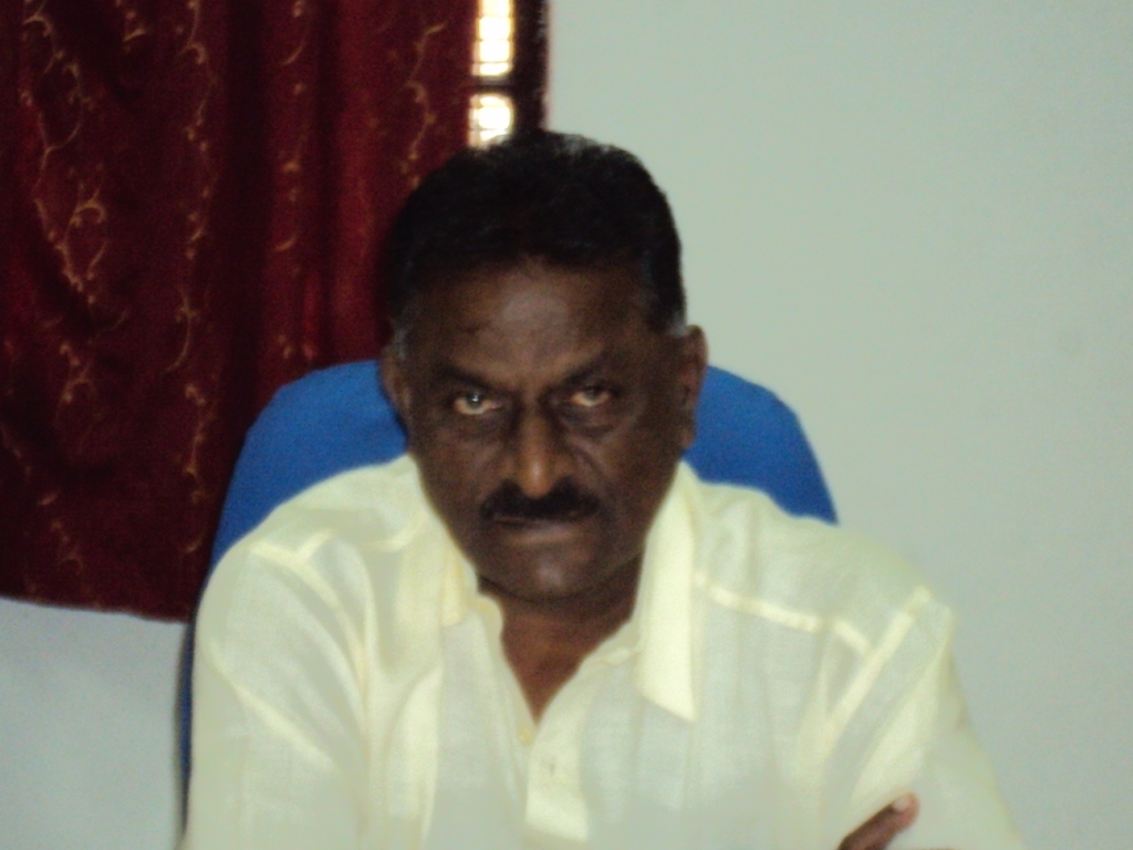 வா. பாஸ்கரன் - ஒலிம்பிக் போட்டியில் தங்கப்பதக்கம் வென்ற இந்திய அணியின் தலைவர்.